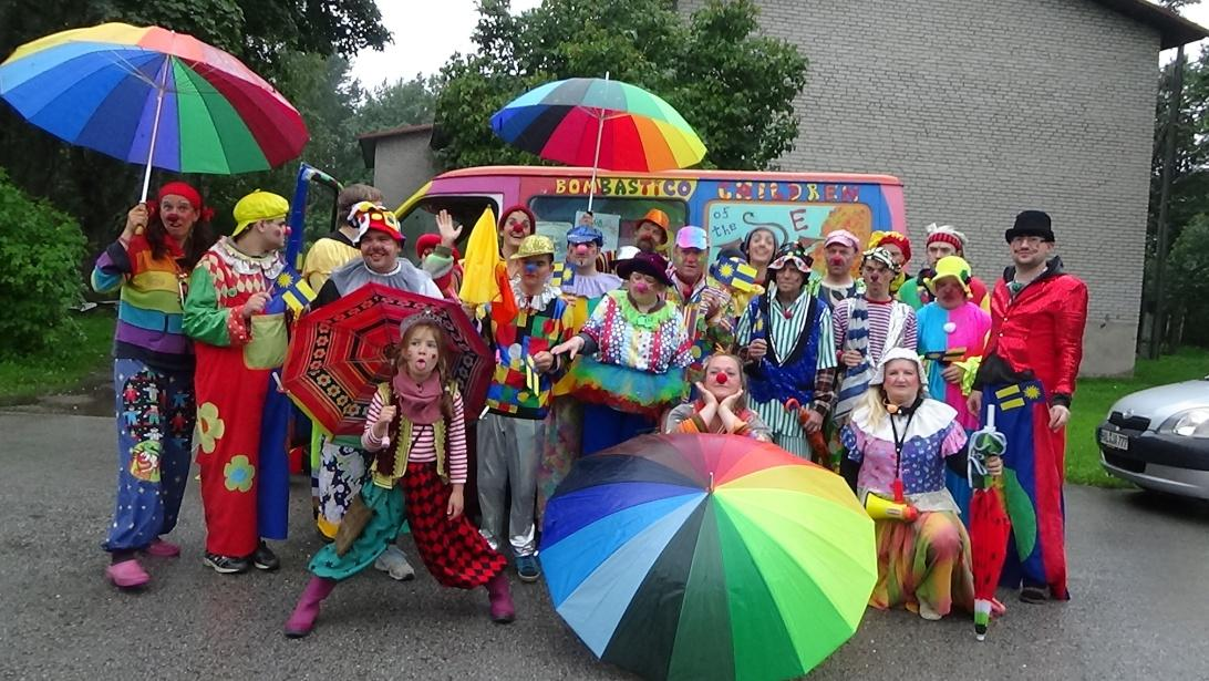 Tsirkus Bombastico-Schokokaboom-Jeee, Narva-Jõesuu 2016